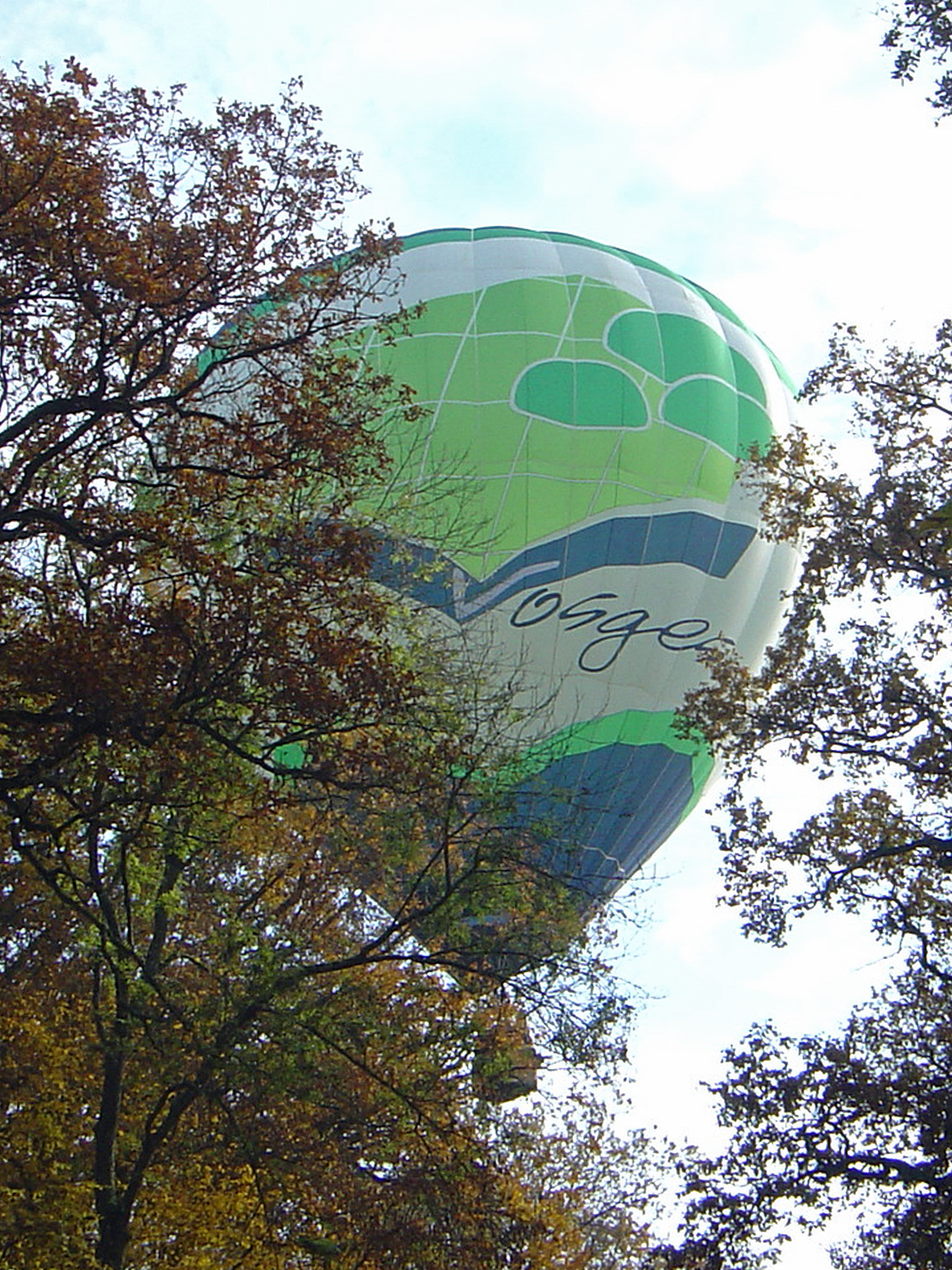 Montgolfière du conseil général des Vosges